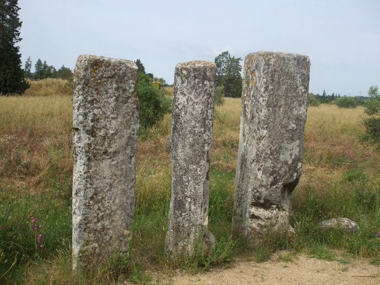 Trois bornes milliaires, dites Colonnes de César ou Peyrous Plantadous, à Beaucaire (Gard, France).